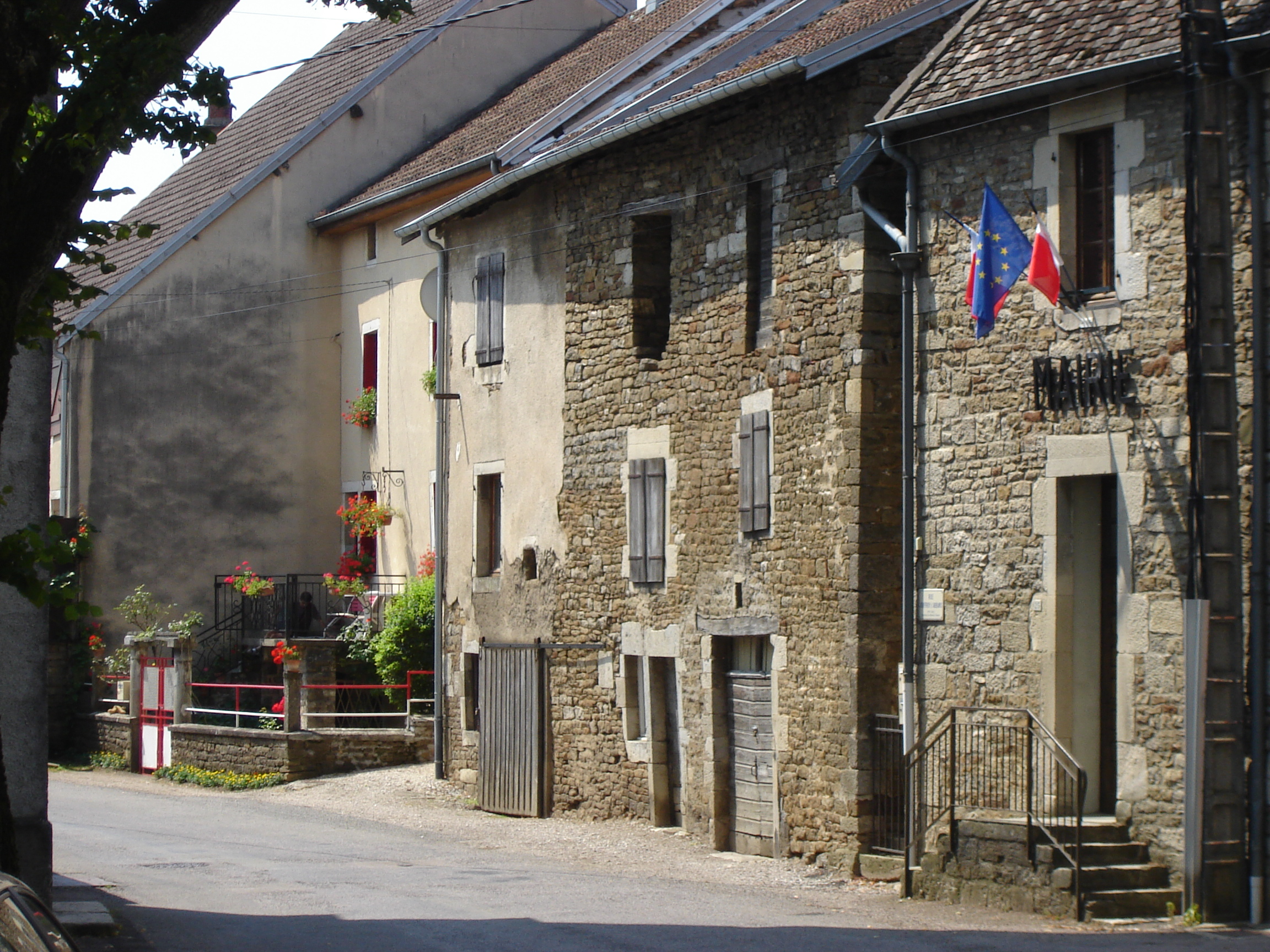 Mairie d'Abbans-Dessus le 30 juillet 2008